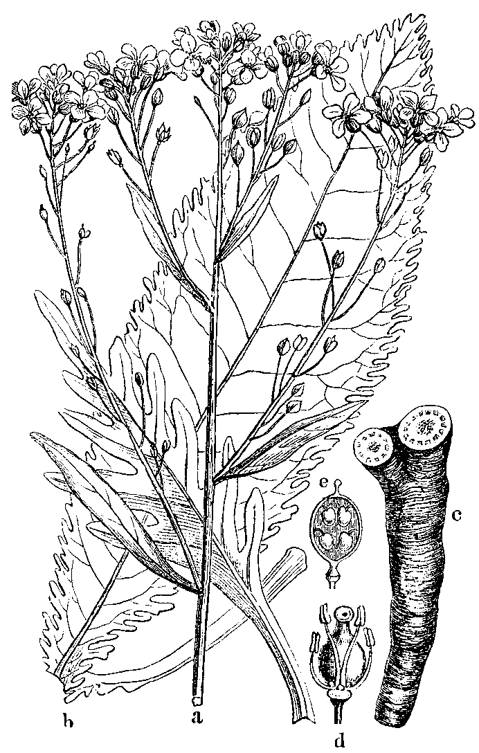 Slika 189. Navadni hren. (Armorácia rusticána.)